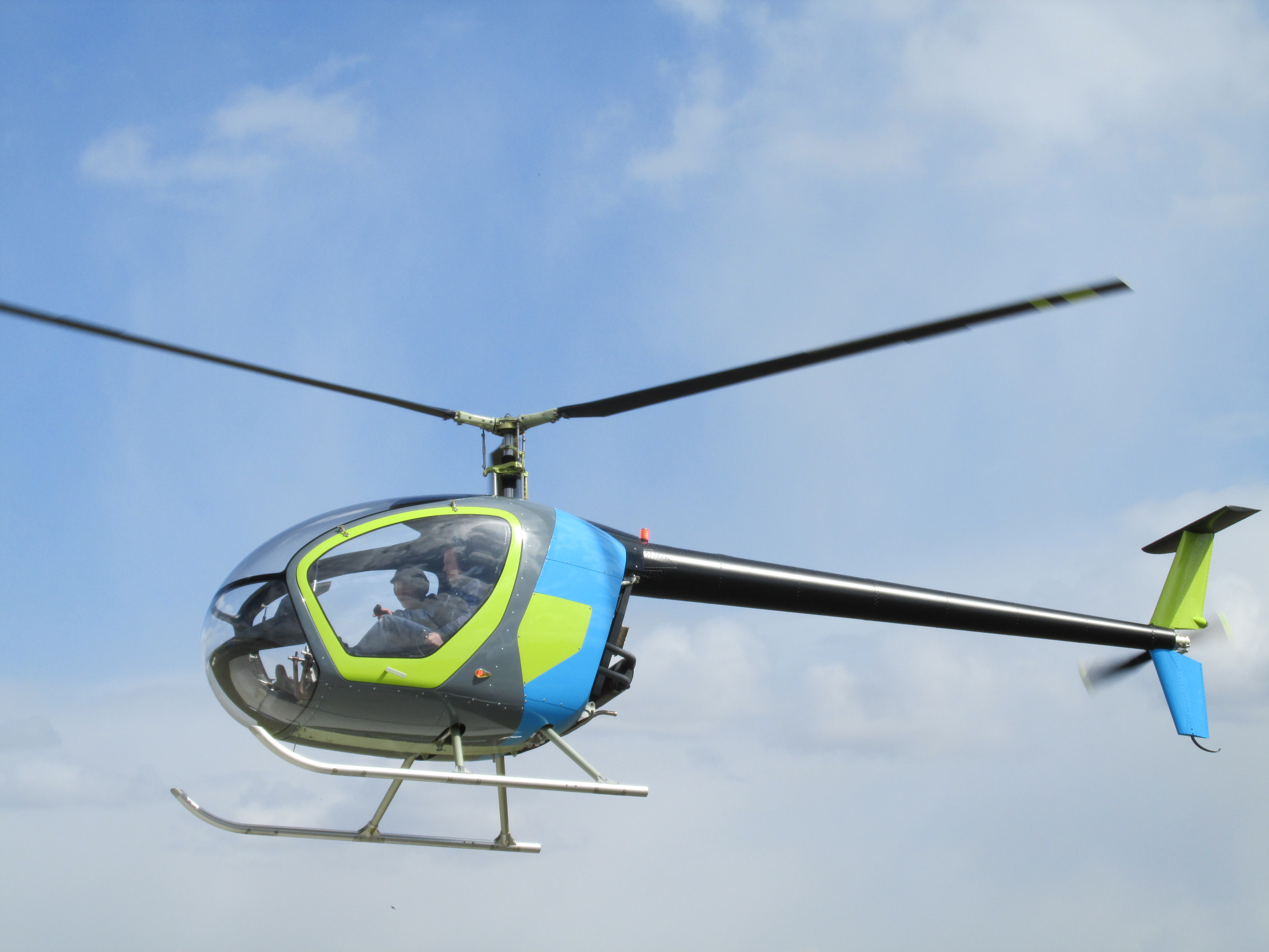 Skyline SL-231 в польоті. с. Гора, Київська область, Україна.